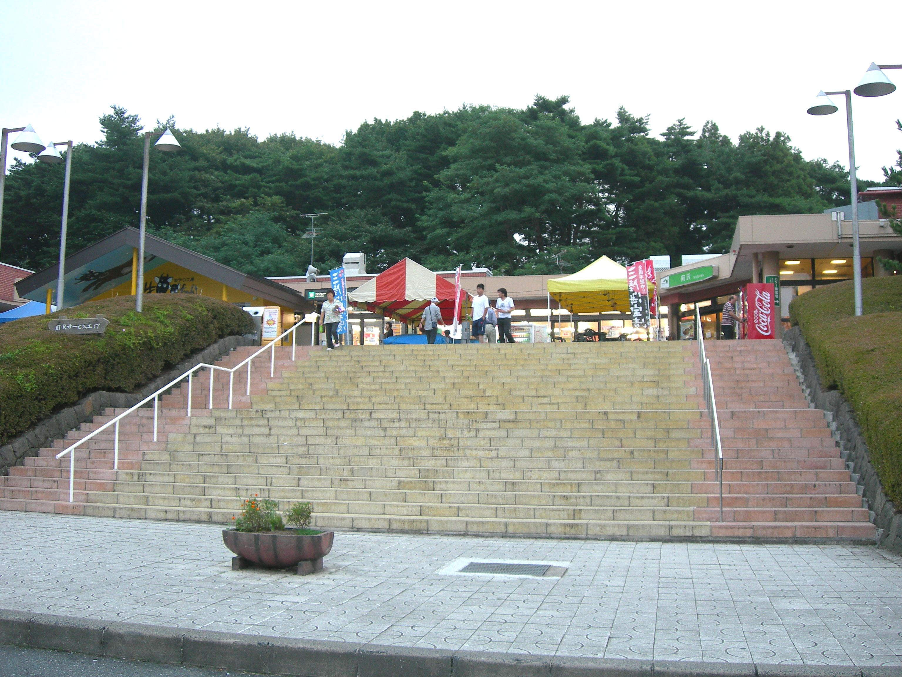 前沢サービスエリア 下り線施設